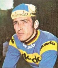 Gilbert Bellone (1972), 'Sprint 72', Panini figurina n°100.